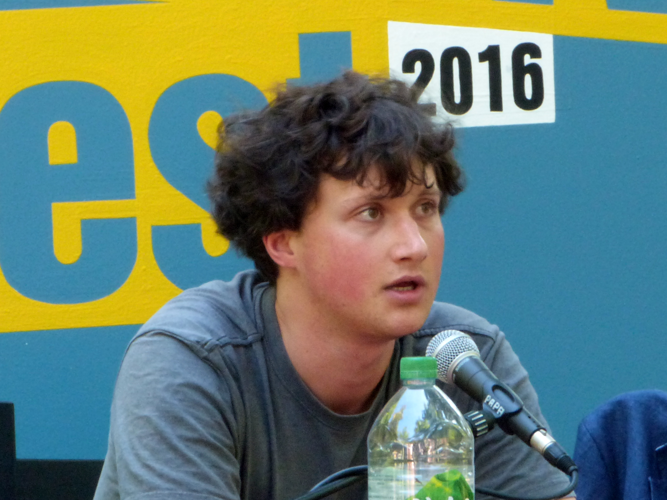 Schriftsteller Joshua Groß während eines Interviews auf dem Erlanger Poetenfest 2016